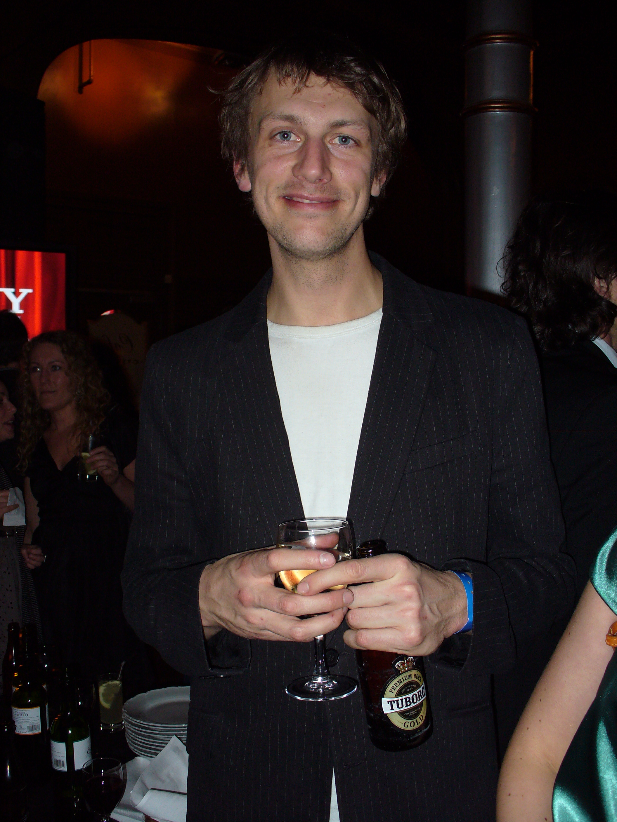 Olle Palmlöf at Aftonbladet TV Awards